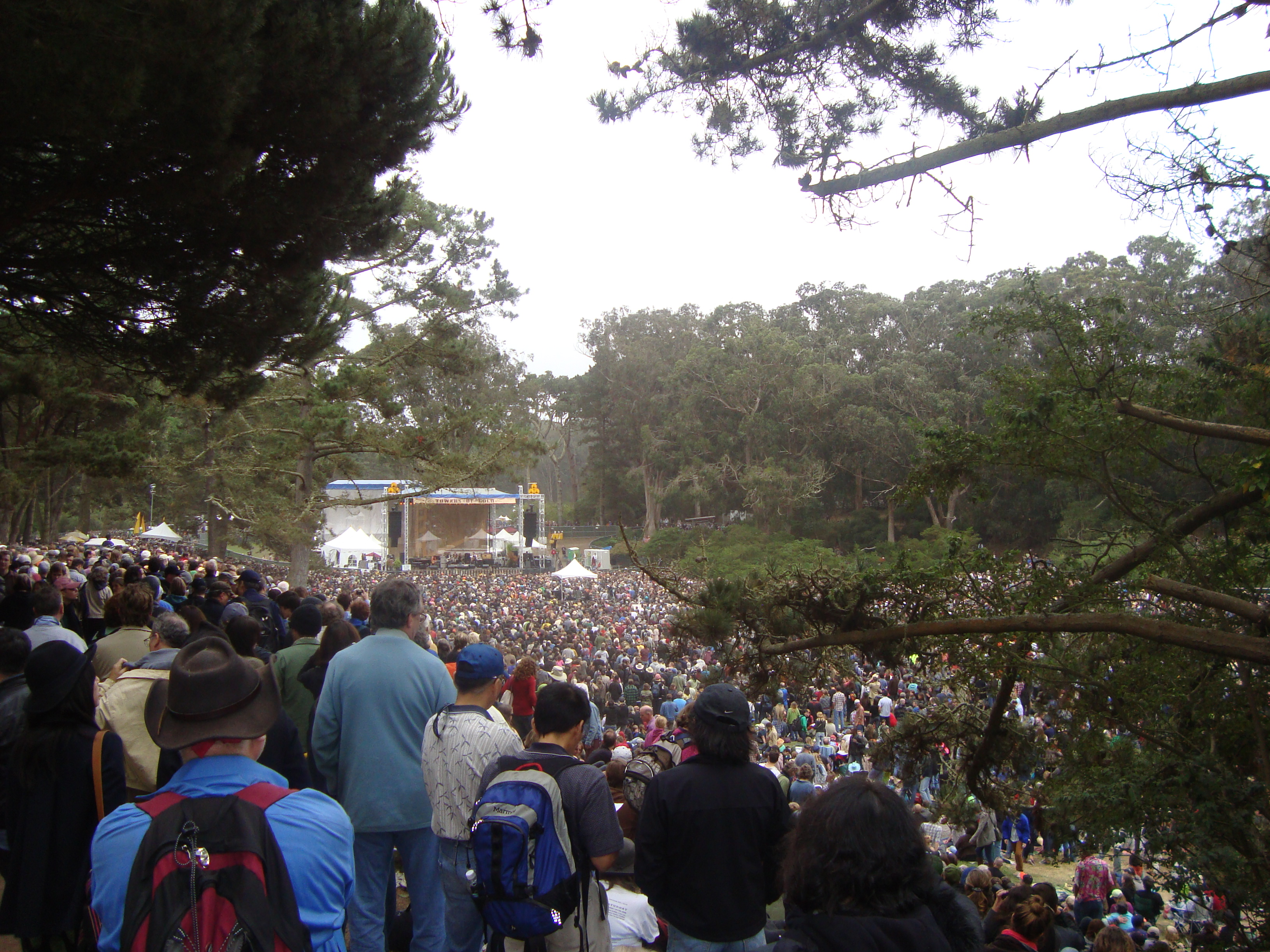 En af scenerne til bluegrassfestivalen Hardly Strictly Bluegrass, 2010